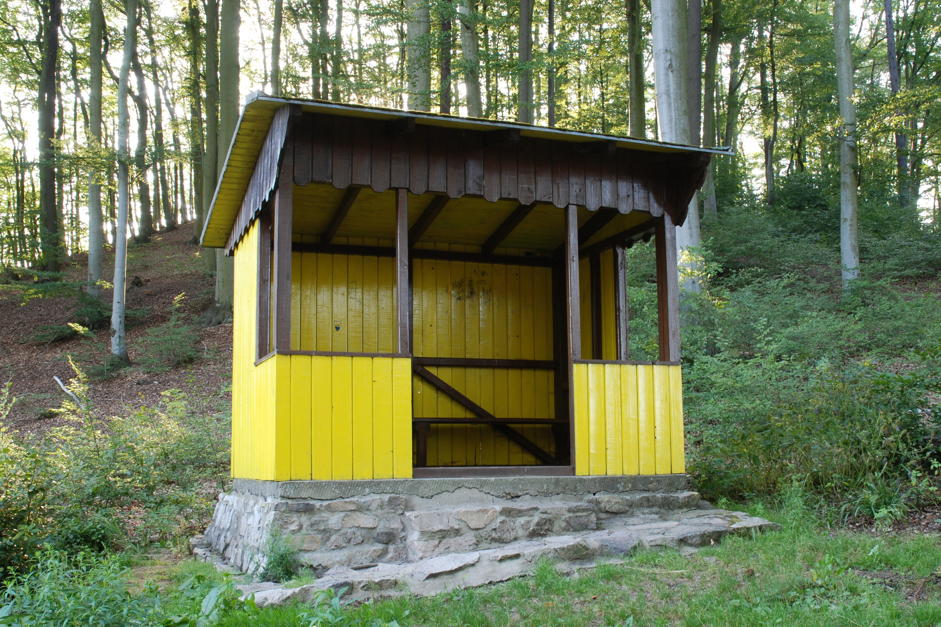 Chata V Sedle v karlovarských lázeňských lesích pod Ottovou výšinou